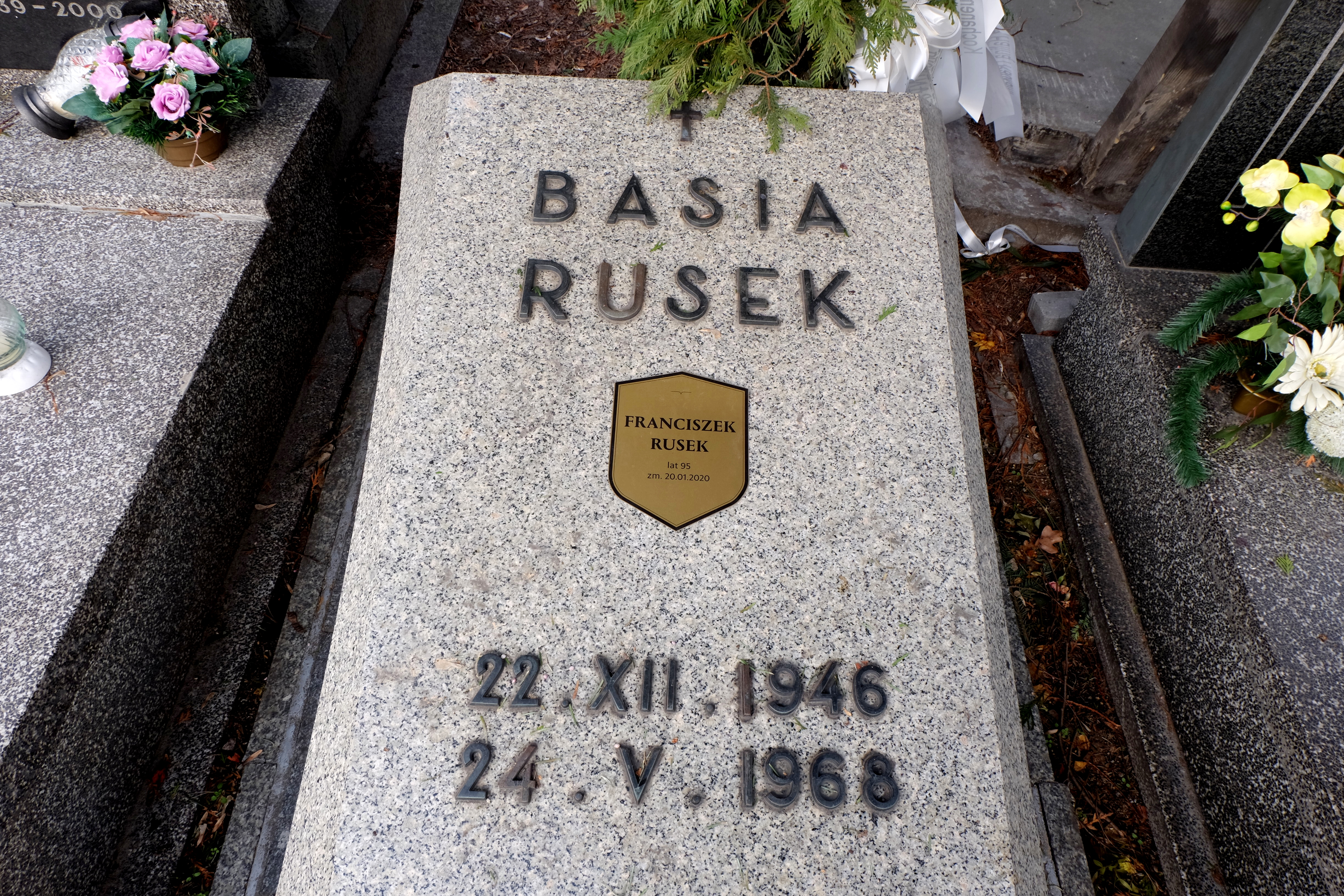 Grób prokuratora generalnego Franciszka Ruska na Cmentarzu Wojskowym na Powązkach w Warszawie